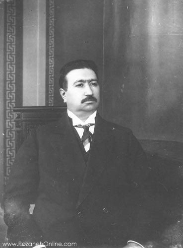 Mohammad Ali Shah Qajar - AFTER deposal